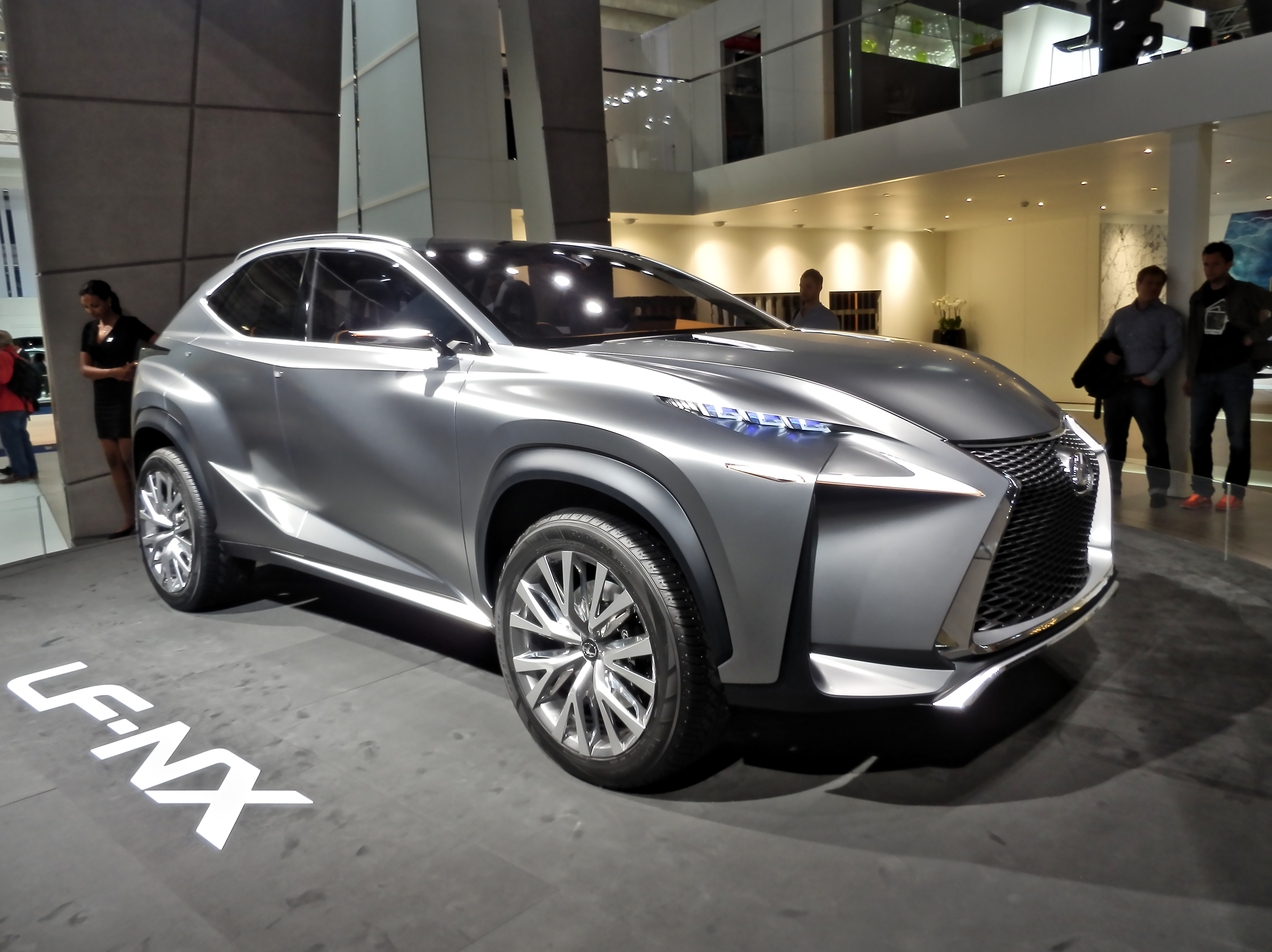 Lexus LF-NX at IAA 2013